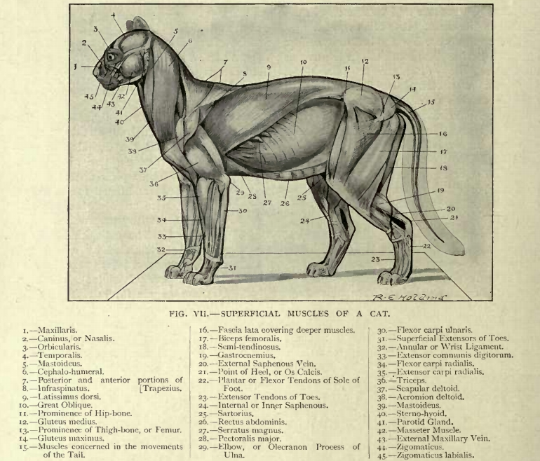 Superficial muscles of a cat